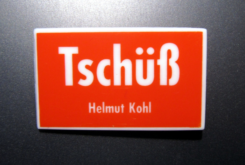 Button gegen Helmut Kohl im Wahlkamp 1998 (Tschüß in der Schreibweise mit Eszett)